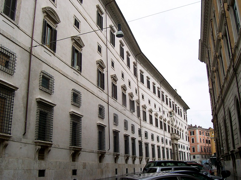 Roma - Palazzo Borghese